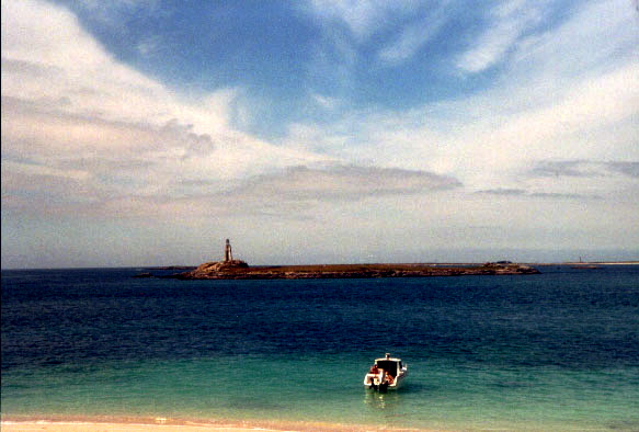 Guéotec vu depuis l'île de Penfret. Juillet 1997 Licence GFDL. Auteur : Flore Allemandou